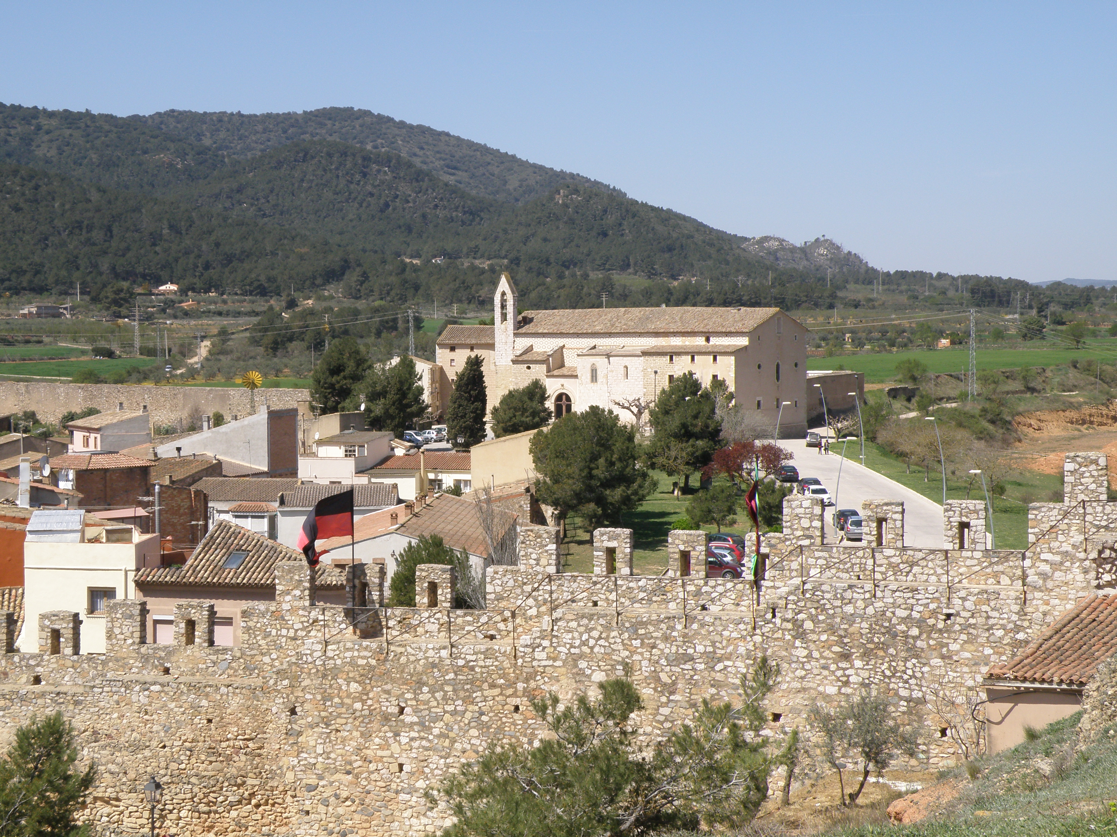 Santuari de la Mare de Déu de la Serra a Montblanc vista des del pla del castell